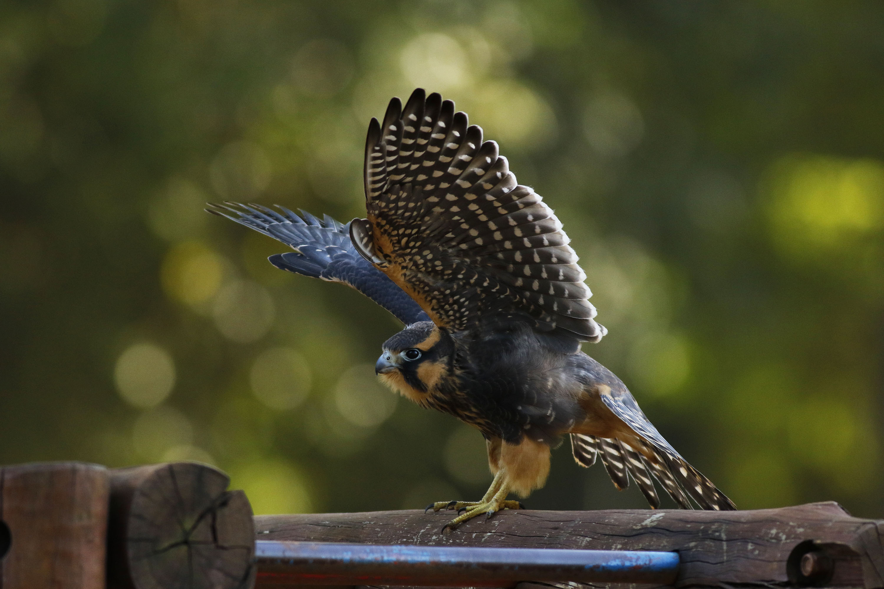 Falcão de coleira (Falco femoralis) filhotes em um dos seus primeiros vôos.